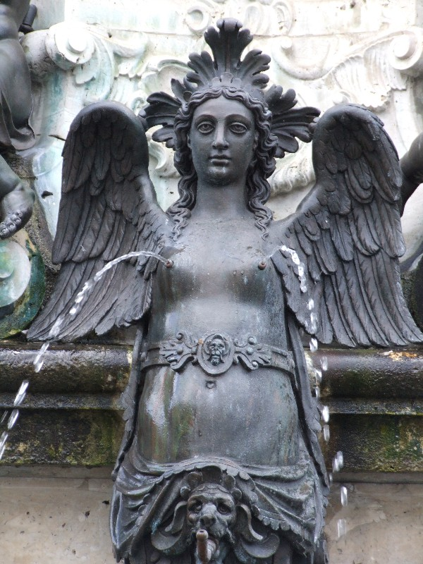 Augustusbrunnen Augsburg Brunnenfrau